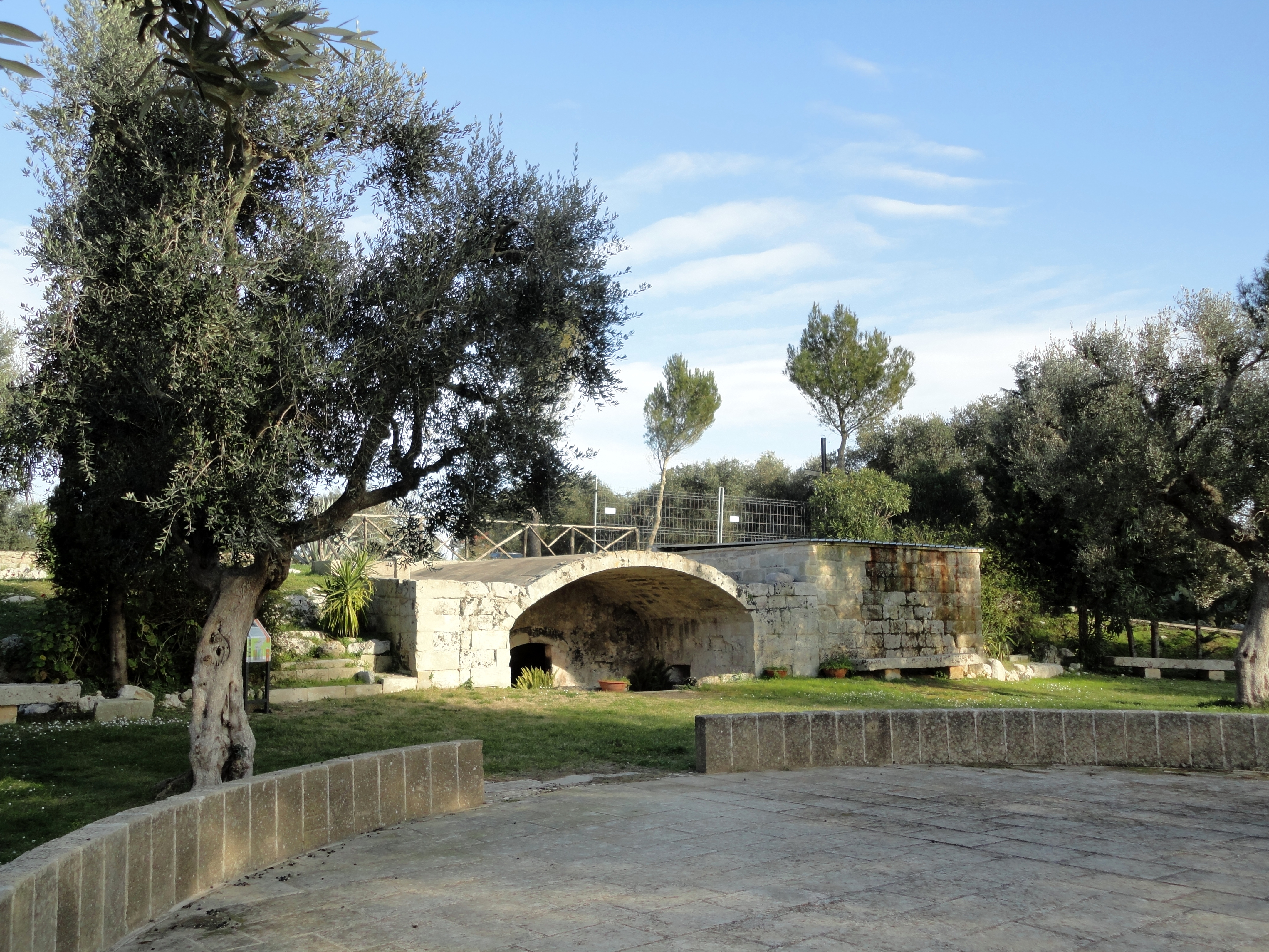 Cripta bizantina di San Giovanni Giuggianello, Lecce